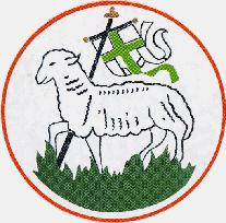 Wappen der Gemeinde Leimbach/WAK